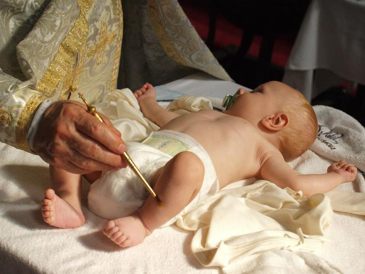 Křest novorozence v pravoslavné církvi